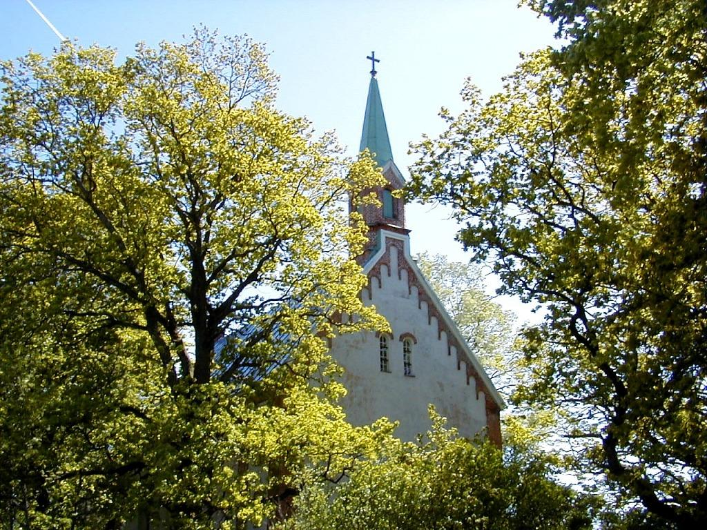 Babītes Sv. Annas luterāņu baznīca 2000-05-06